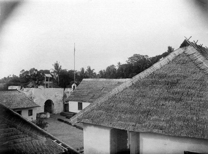 Repronegatief. Binnenplaats van fort "De Verwachting" te Sanana, Soela-eilanden